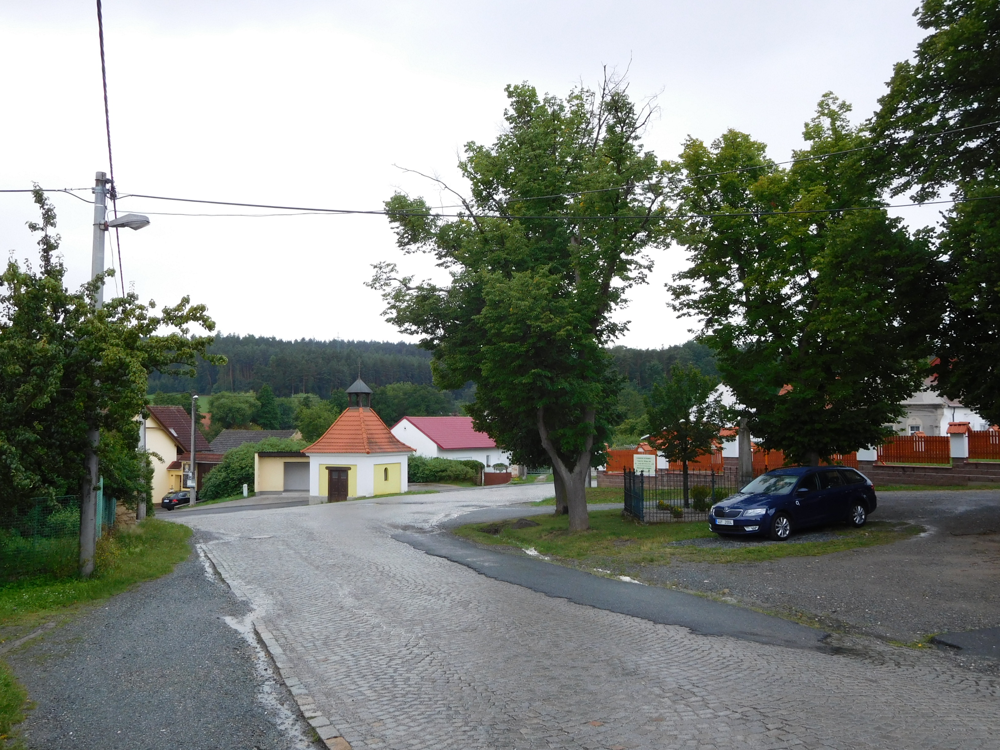 Příšov - náves